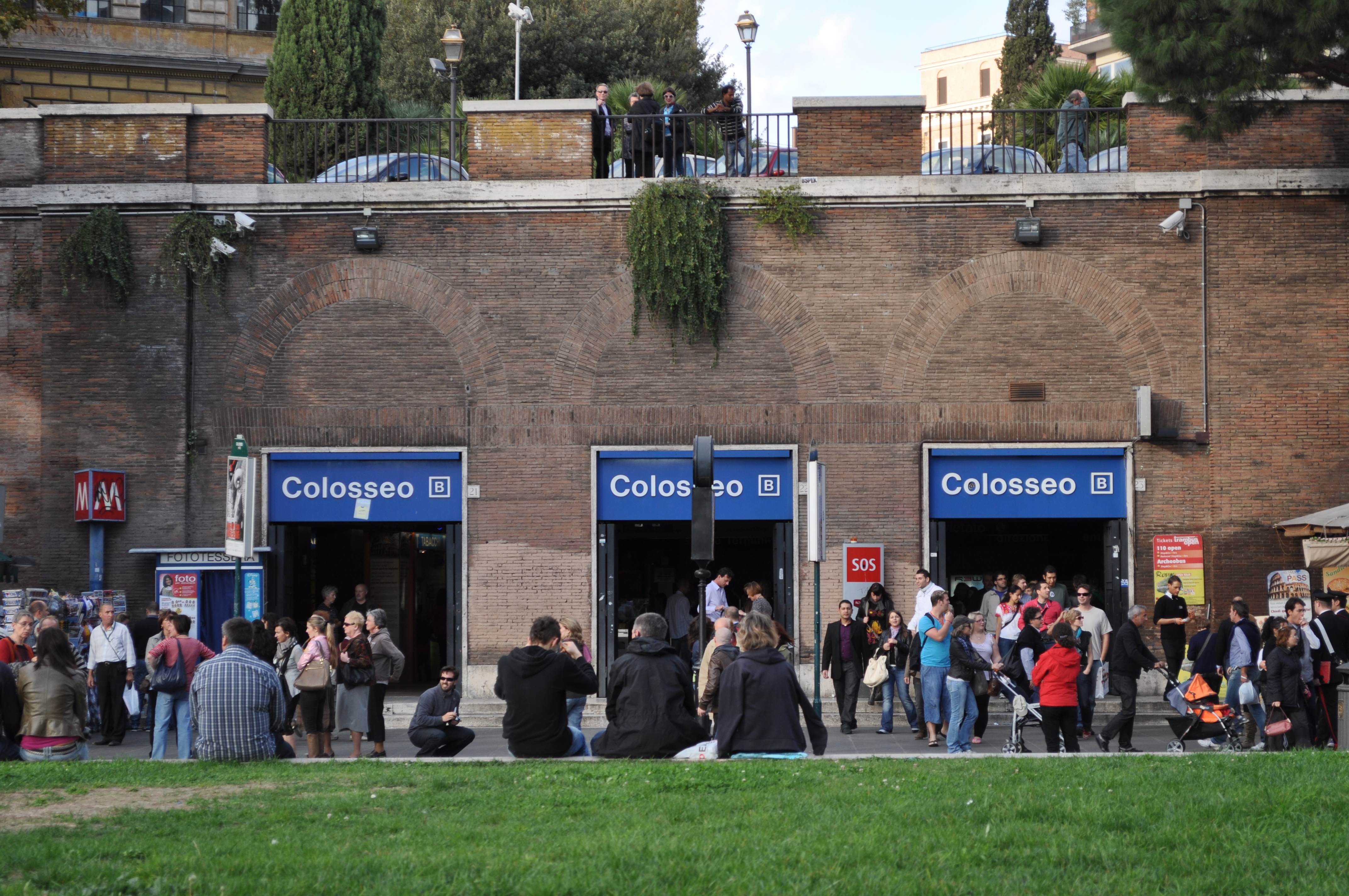 Stazione Colosseo della metropolitana di Roma